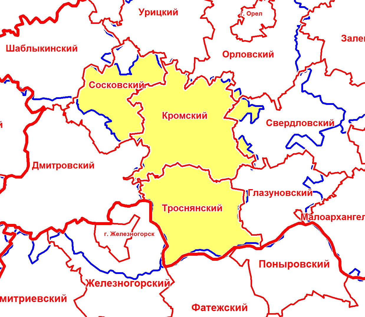 Кромский уезд Орловской губернии в современной сетке районов